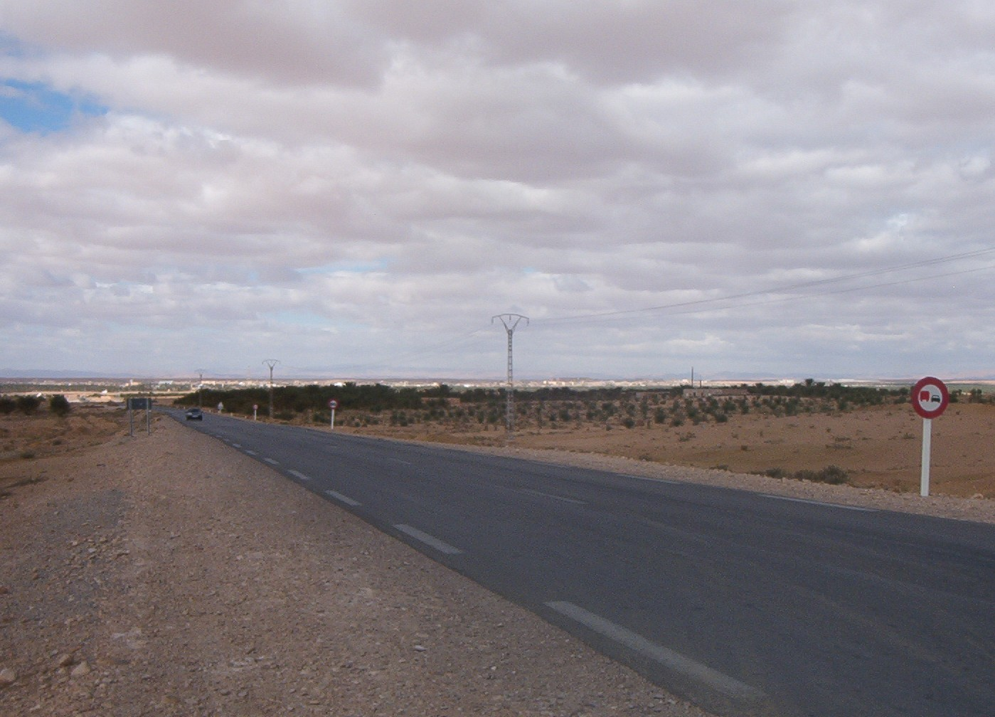 Sortie Sud de Ouled Djellal